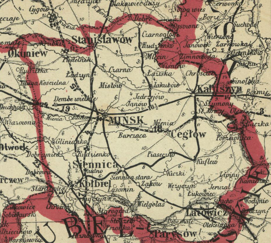 powiat miński, lata 20-ste XX w